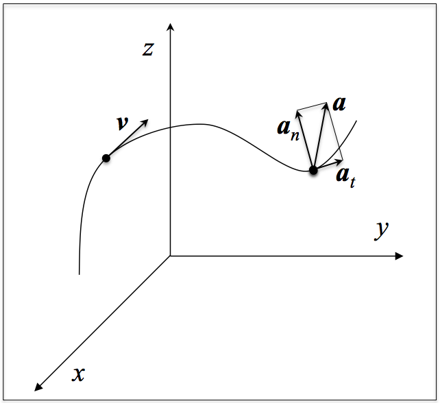 Abiadura eta azelerazioaren norabideak grafikoki adierazten dituen irudia